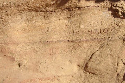 rome paint